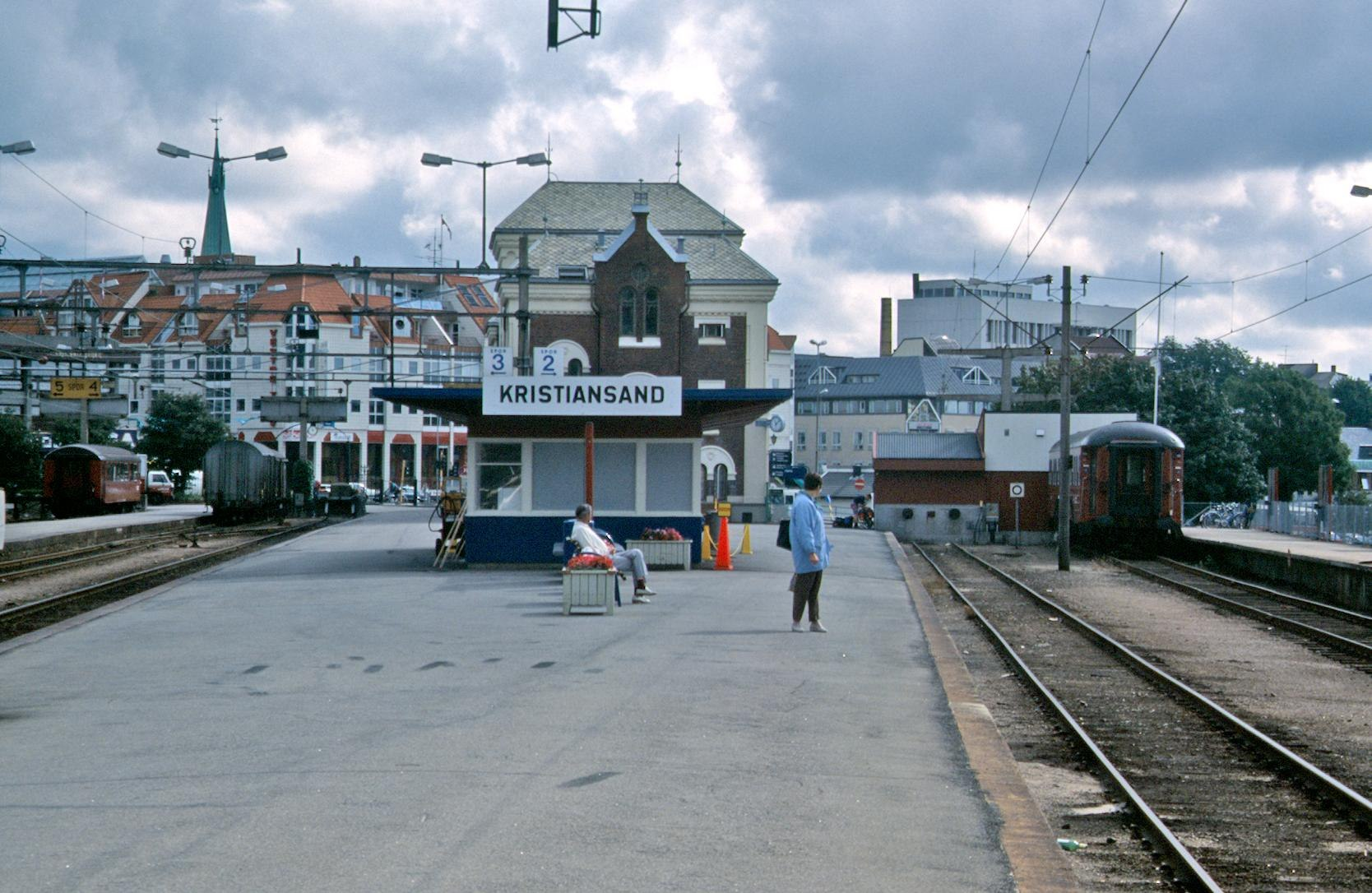 Bahnhof Kristiansand